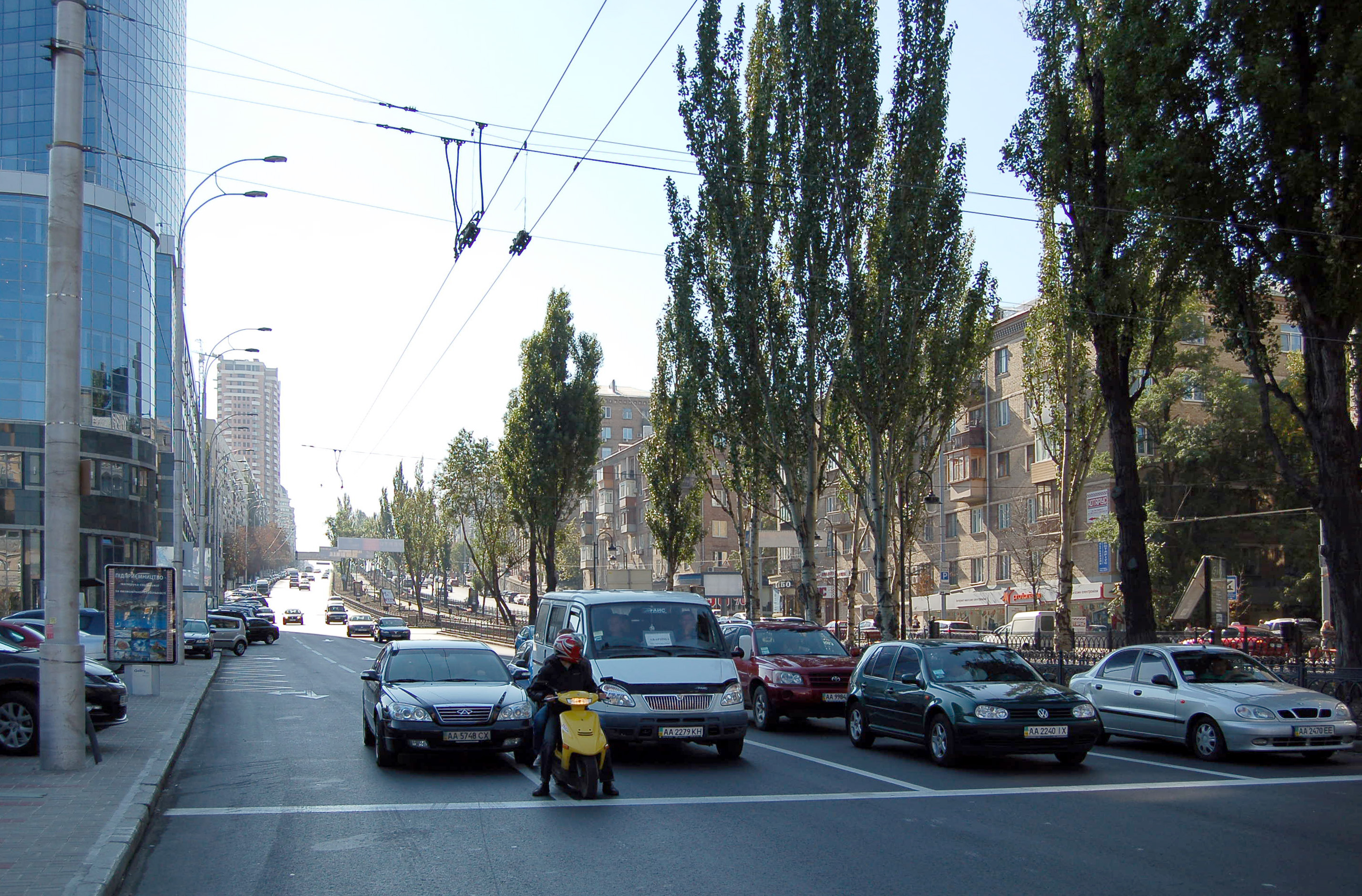 Бульвар Лесі Українки у Києві